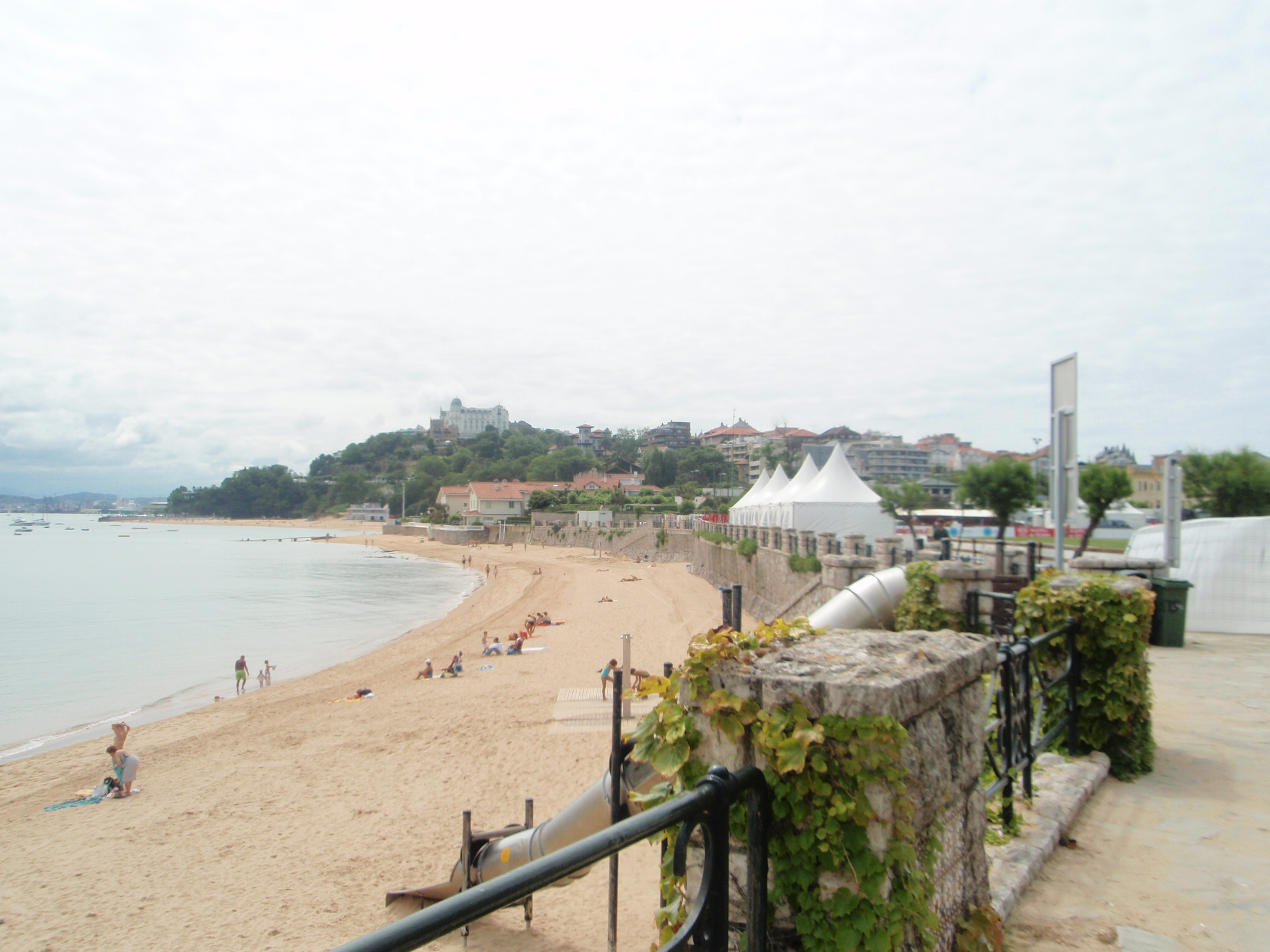 Vista de la playa de la Magdalena, en Santander (Cantabria, España).